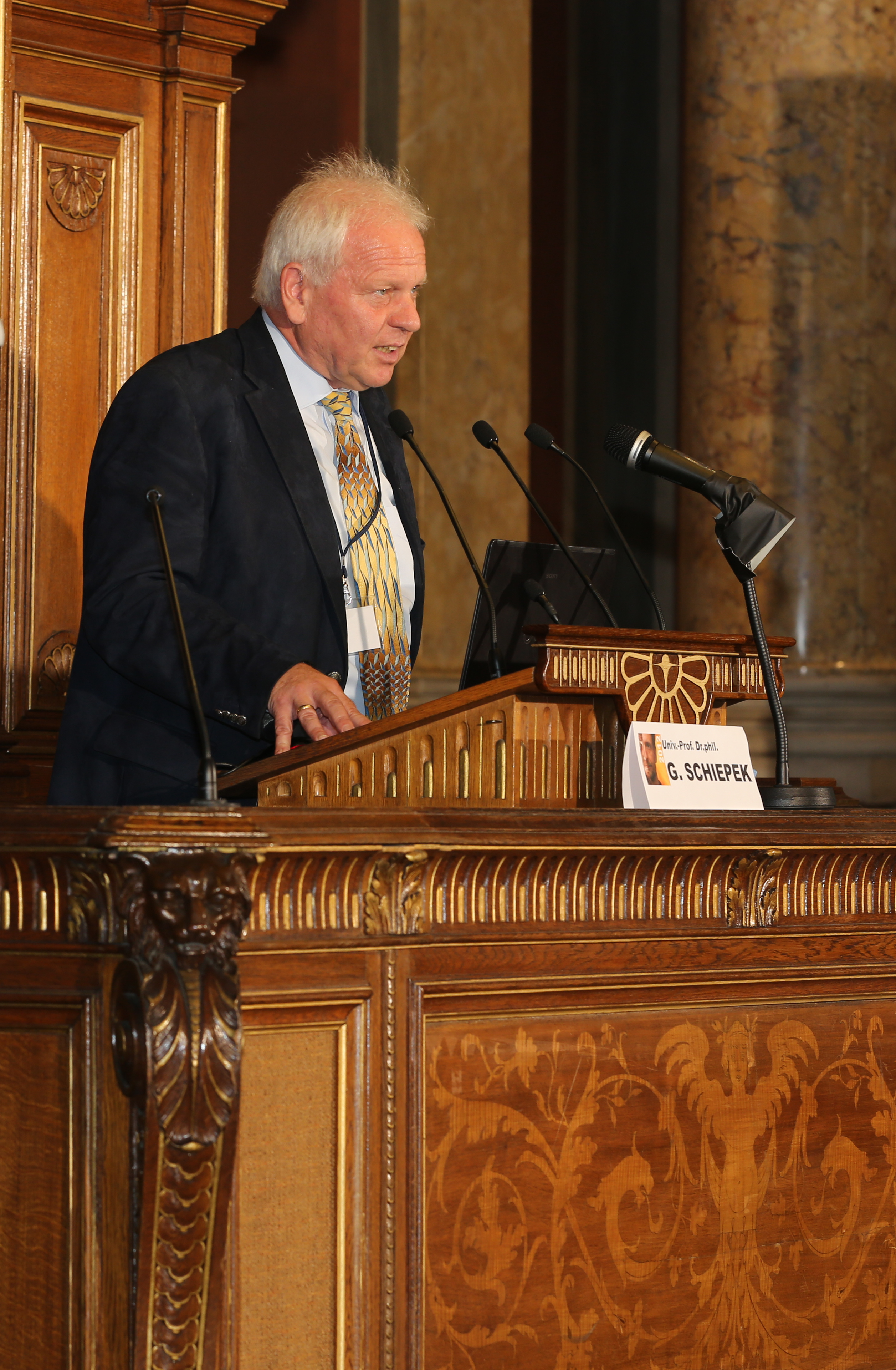 Günter Schiepek auf der Fachtagung "Charakter & Charisma" am 12. Mai 2012